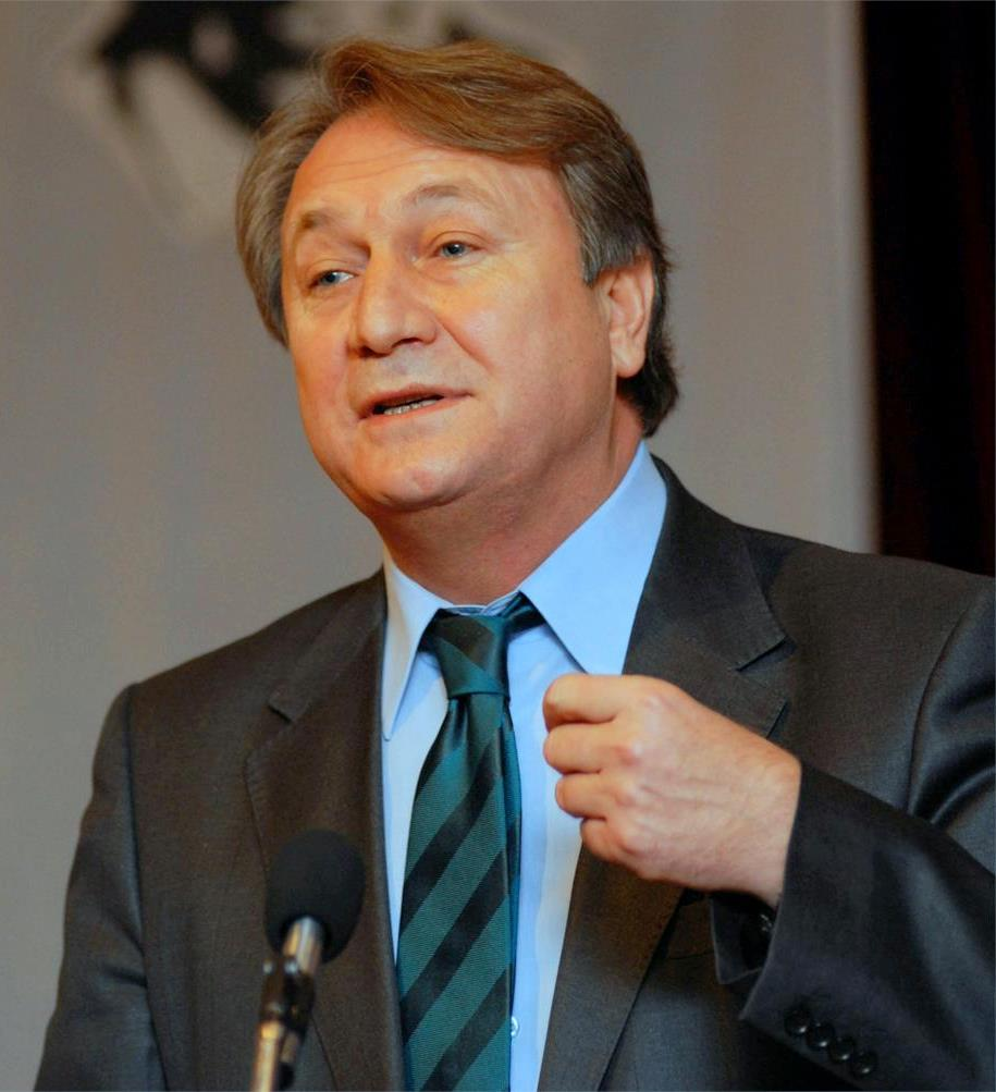 Demokratik Sol Parti Genel Başkanı Zeki Sezer kürsüde konuşurken